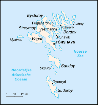 Kaart Faeröer. Nederlandse vertaling CIA-kaart door Danielm 11 jun 2005 21:20 (CEST)